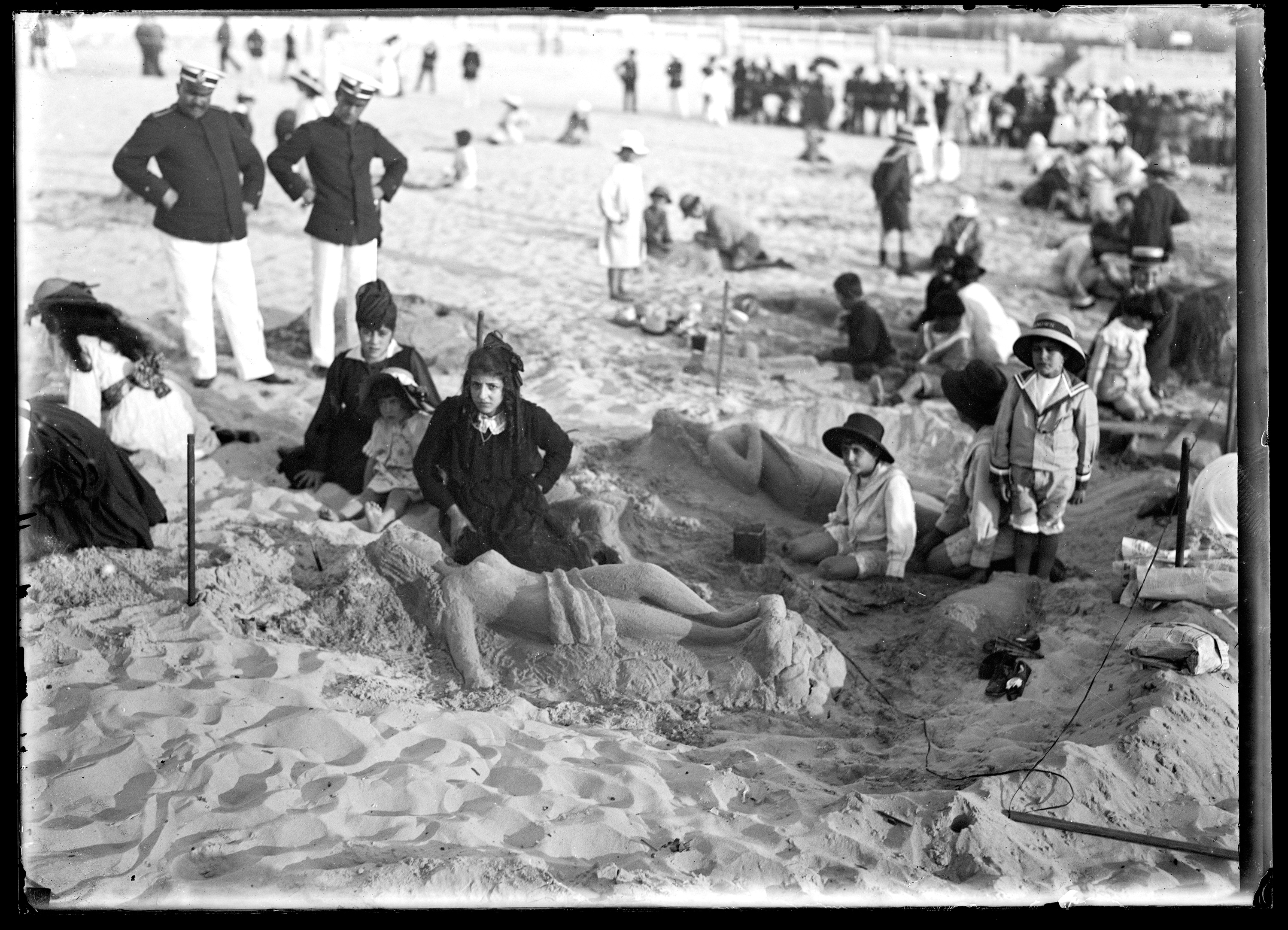 S.i. Concurso infantil de esculturas de arena. Playa Ramírez (Montevideo, Uruguay).